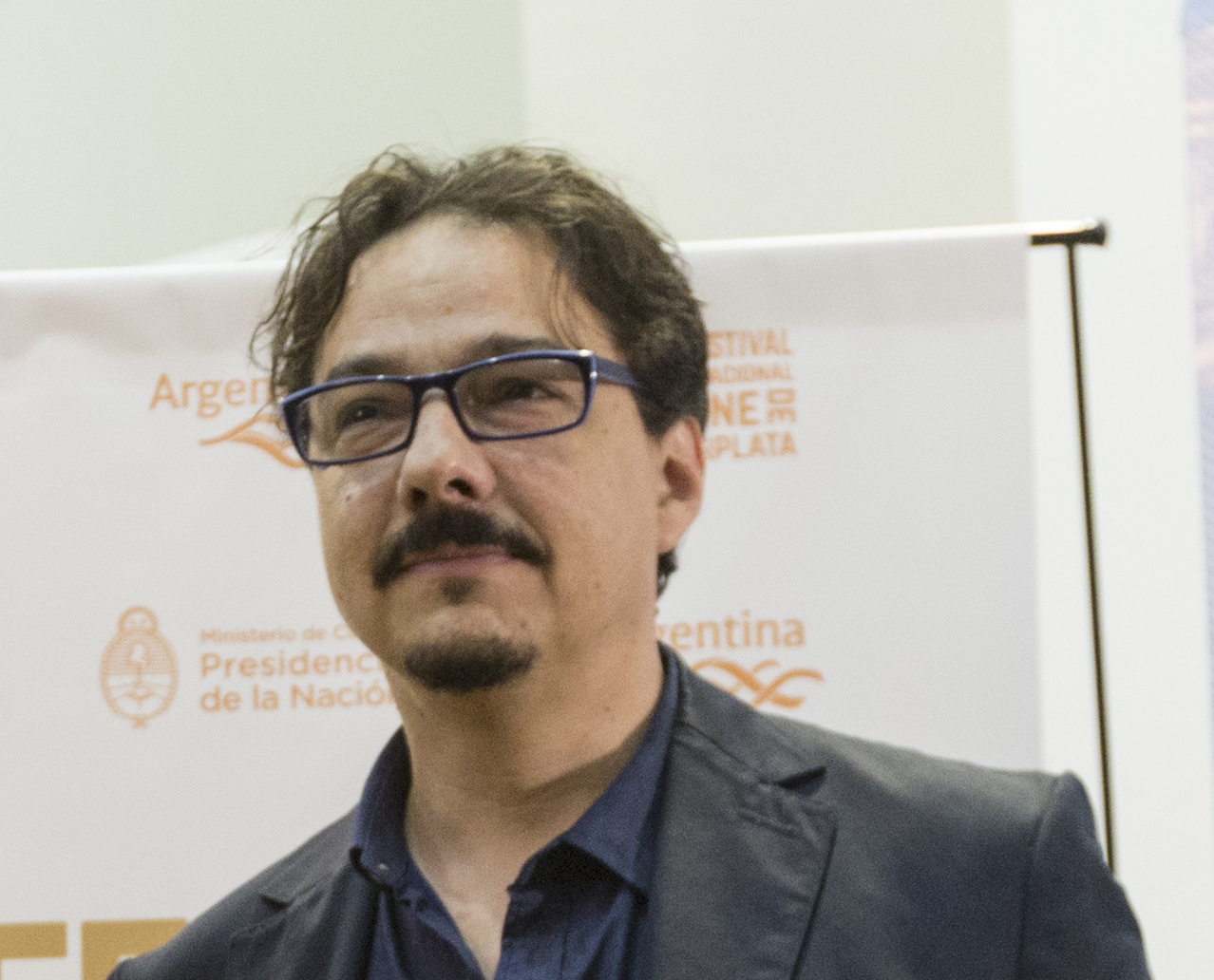 Mar del Plata, 17 de Noviembre de 2017.- Inauguró el 32º Festival Internacional de Cine. Foto: Soledad Amarilla / Mnisterio de Cultura de la Nación Argentina.